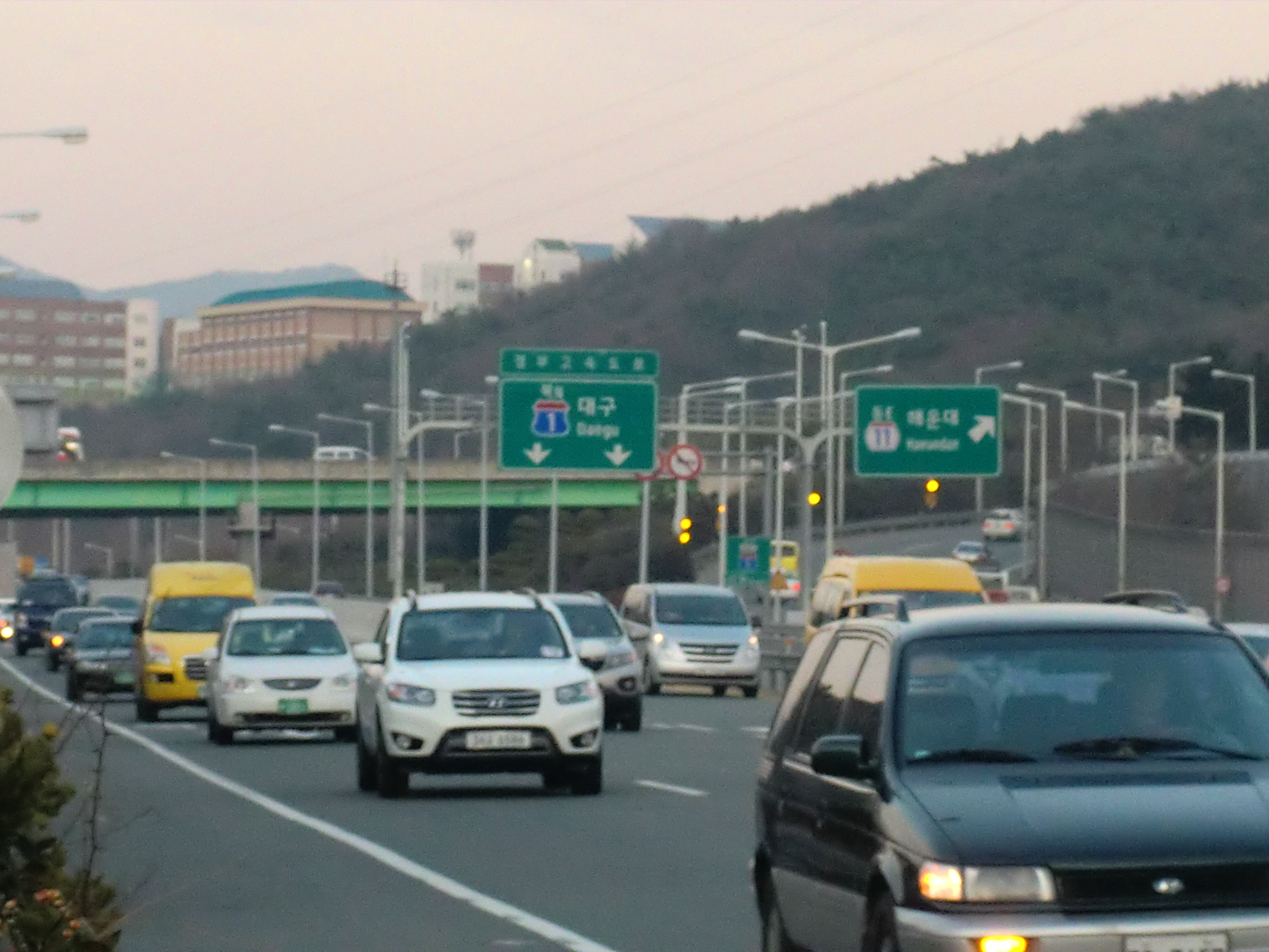 경부고속도로 구서나들목